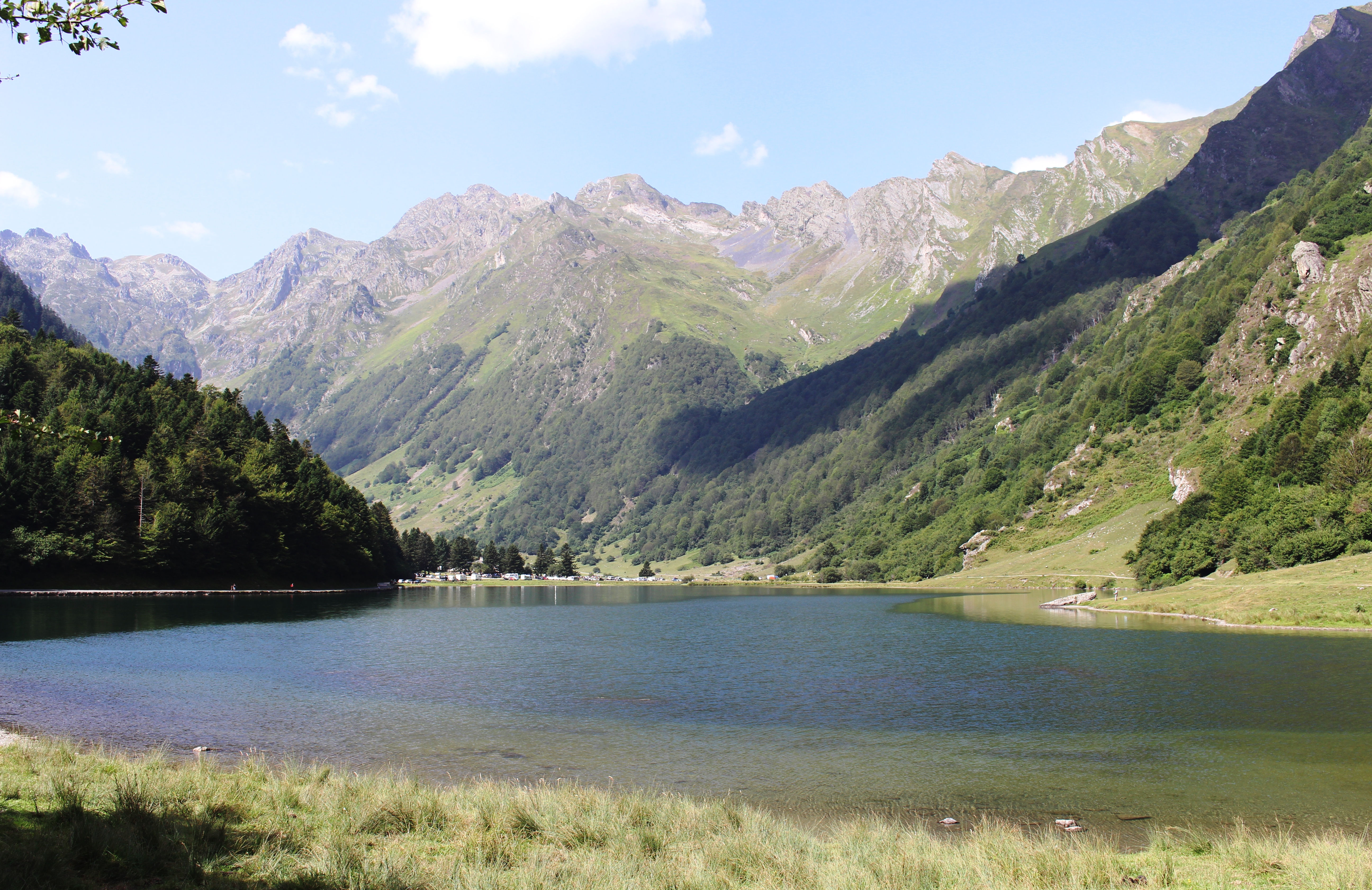 Lac d'Estaing (Hautes-Pyrénées)